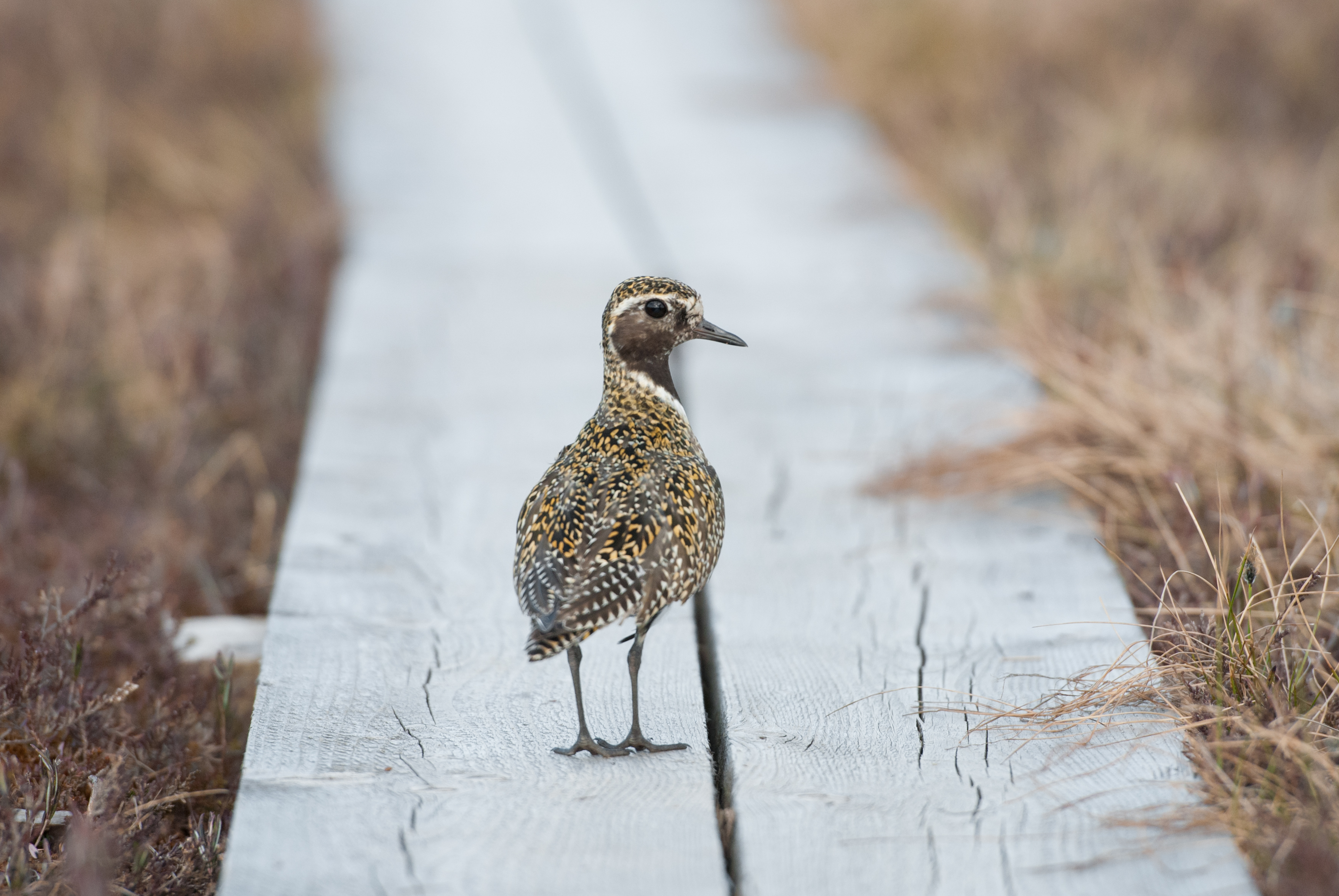 Rüüt kakerdaja raba laudteel